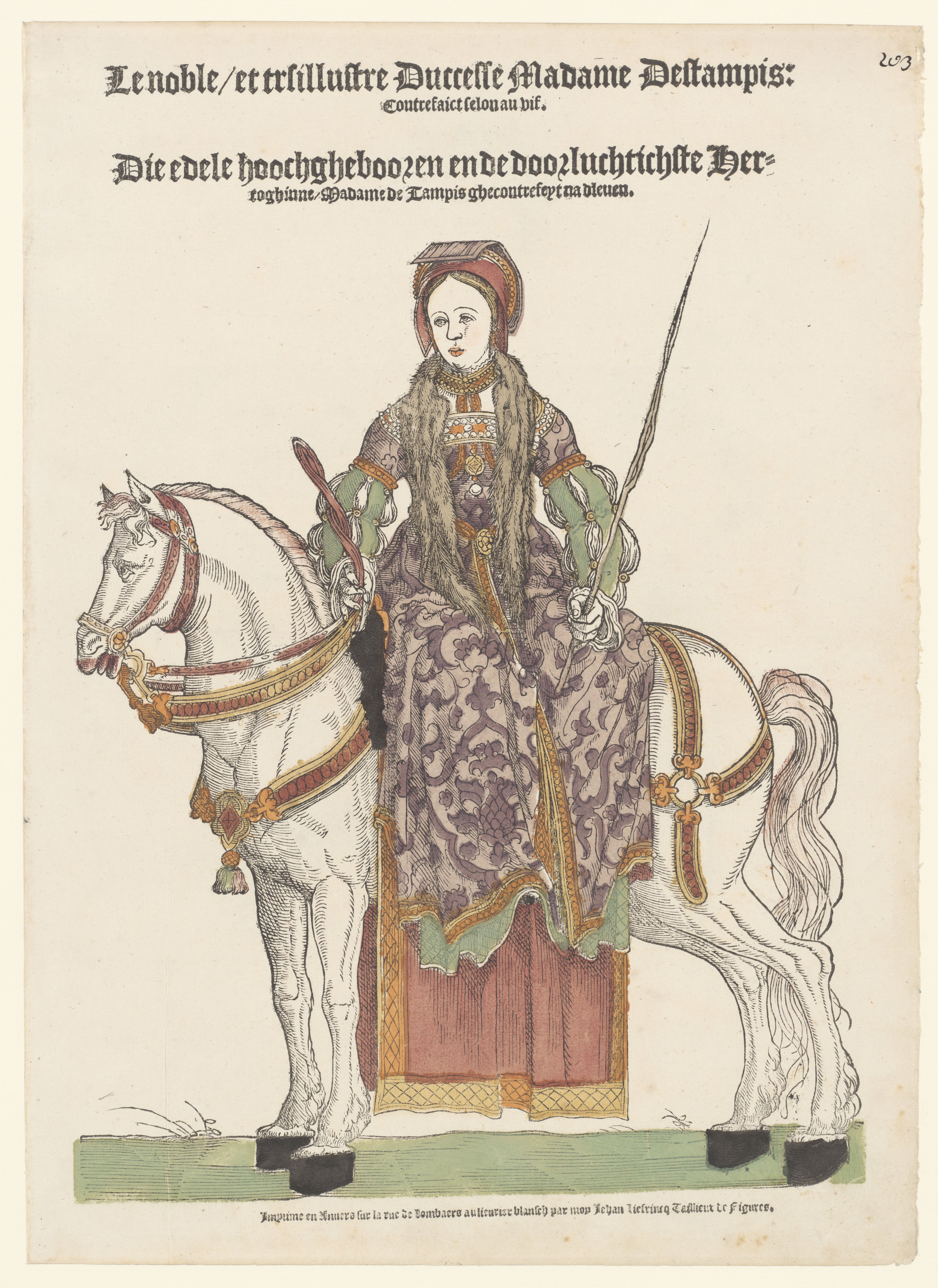 Portrait à cheval de la duchesse d'Etampes, vers 1538-1544. Rijksmuseum, Amsterdam (Pays-Bas).